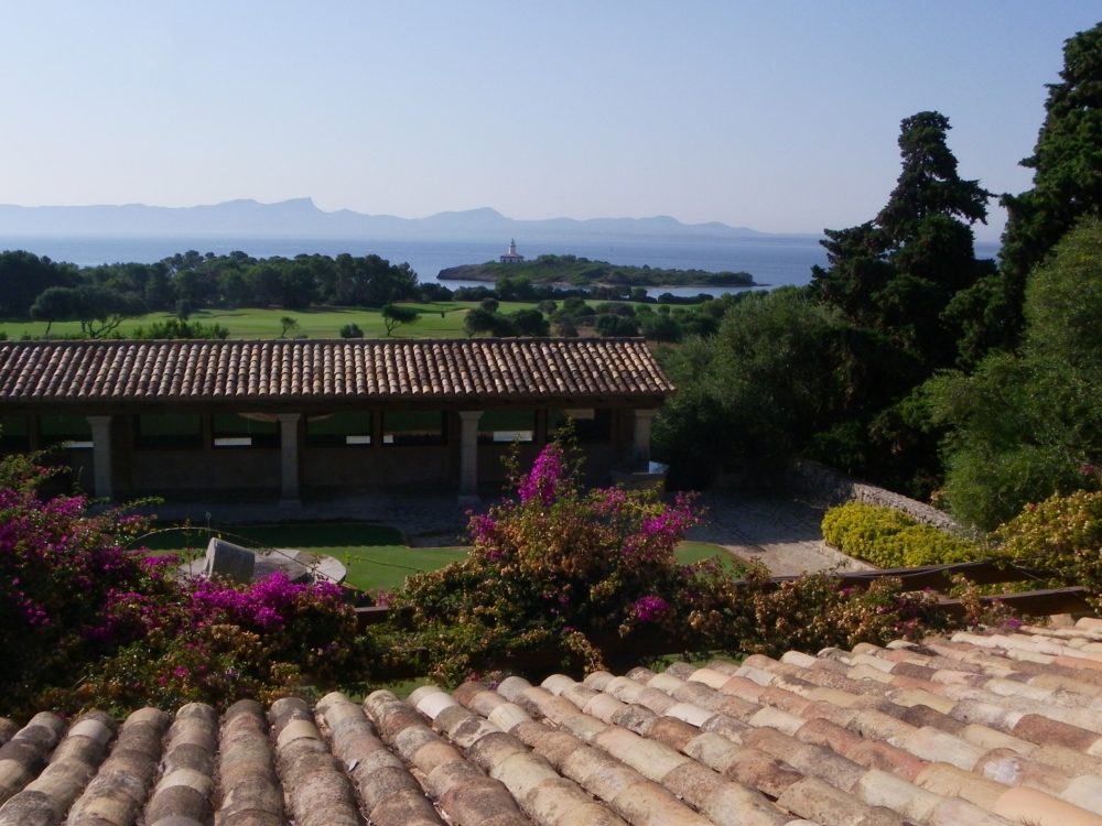 Antiguas casas de Alcanada, sede del Club de Golf Alcanada